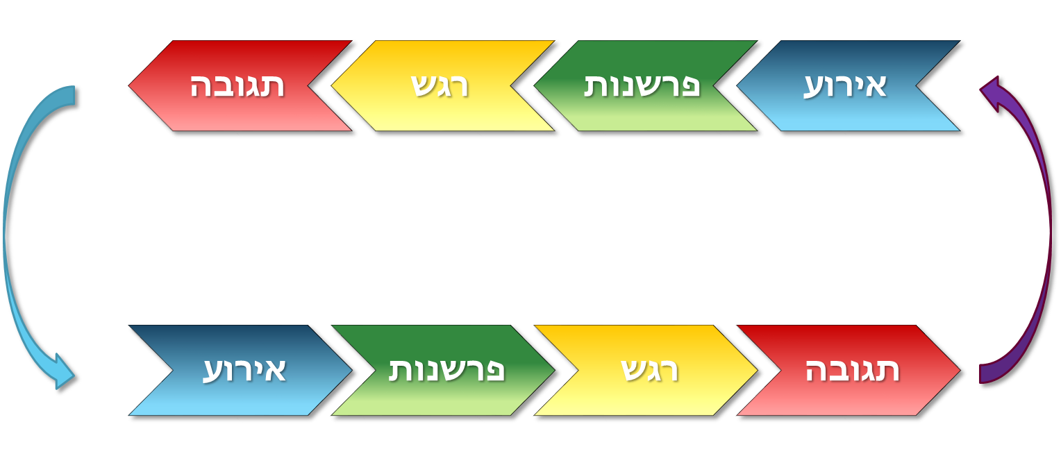 תהליכי אפר"ת באינטראקציה עם אדם אחר תלויים כך האחד בשני, שהתגובה של אדם אחד היא האירוע של האדם האחר, ולהיפך.